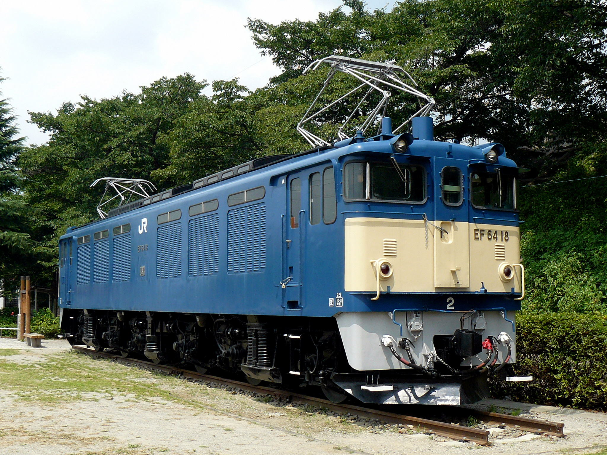 勝沼ぶどう郷駅近くの鉄道遺産記念公園にて保存されているEF64 18